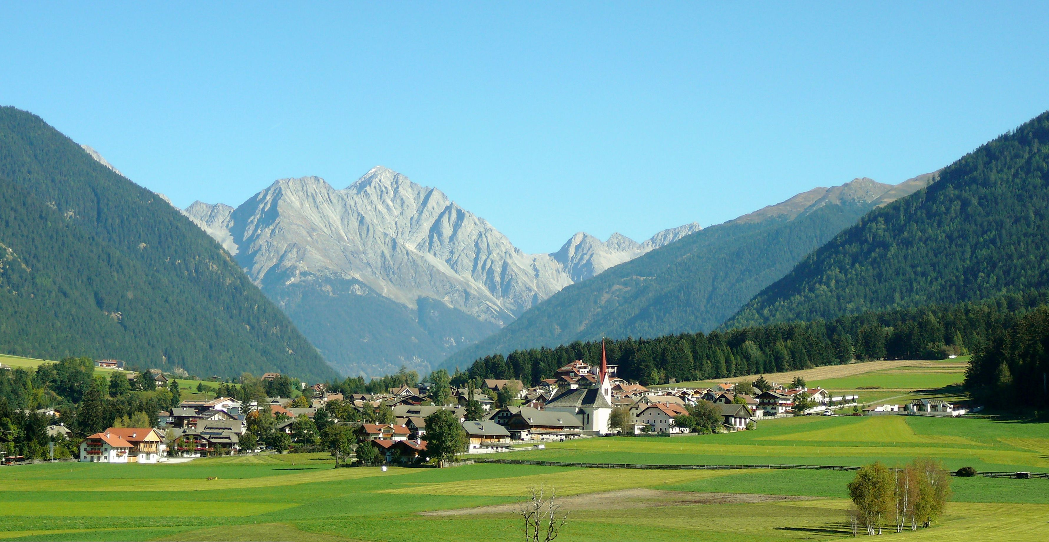 Panorama della valle di anterselva, in primo piano Rasun di Sotto